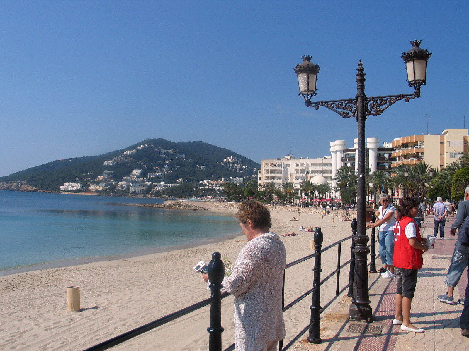 Santa Eularia des Riu